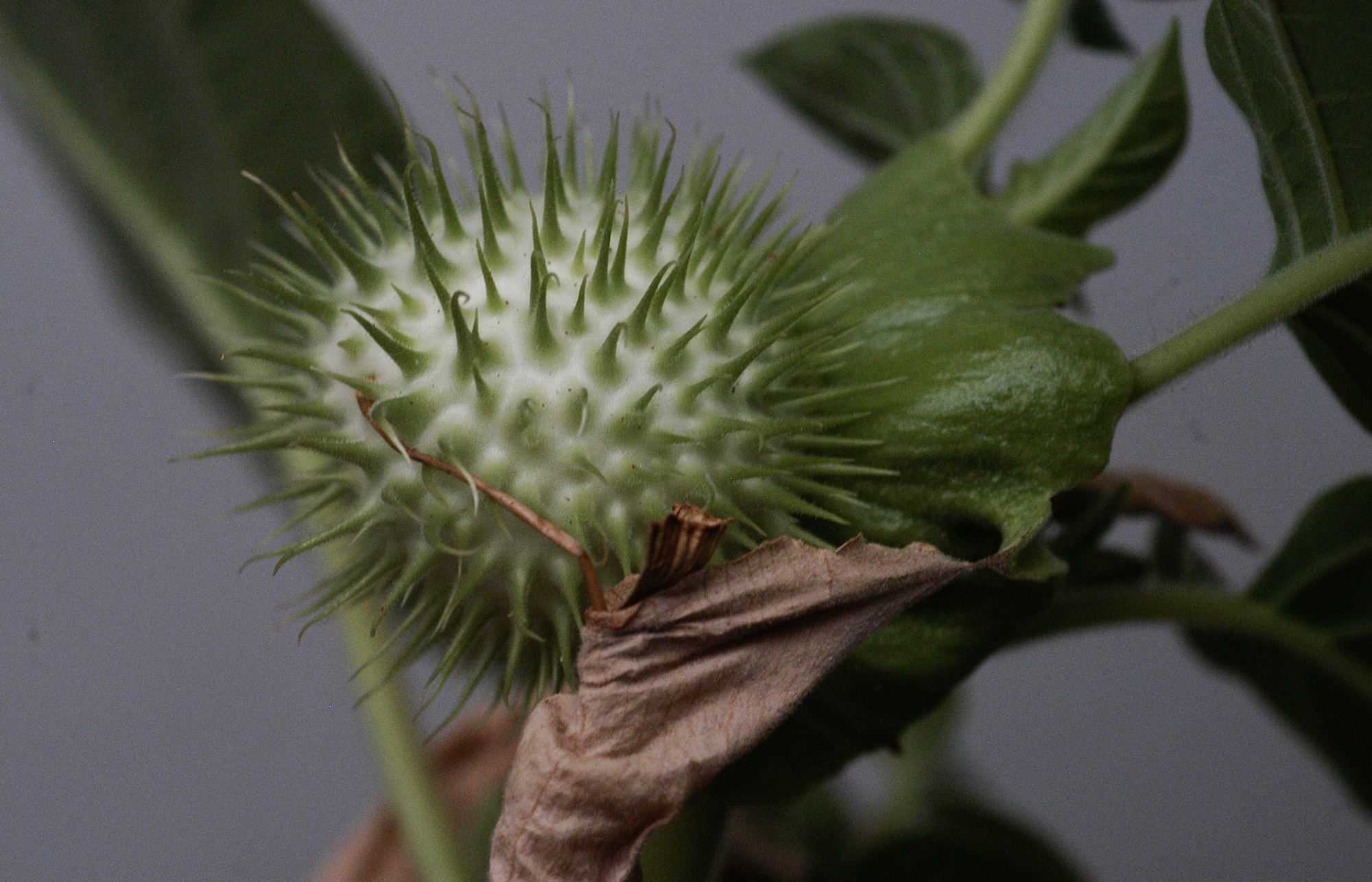 Datura inoxia fruto